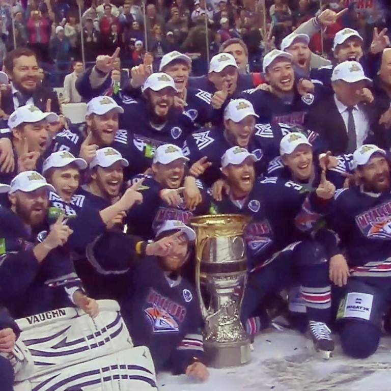 Металург чемпион